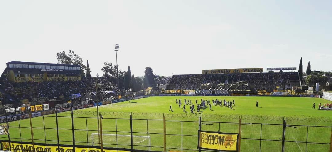 Vista de la Platea y Tribuna norte